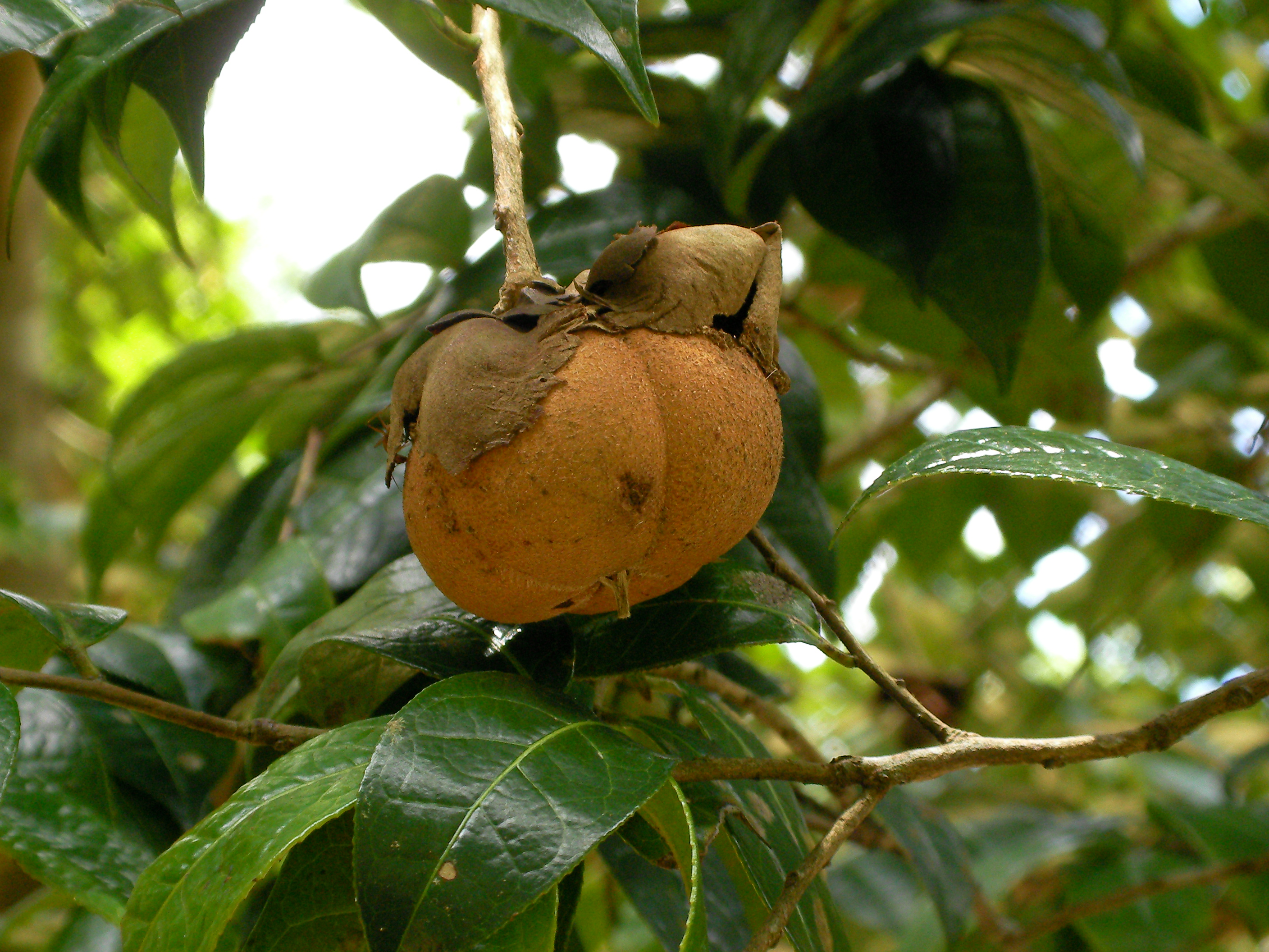 Fruit of Camellia granthamiana, taken in Shing Mun Arboretum, Hong Kong